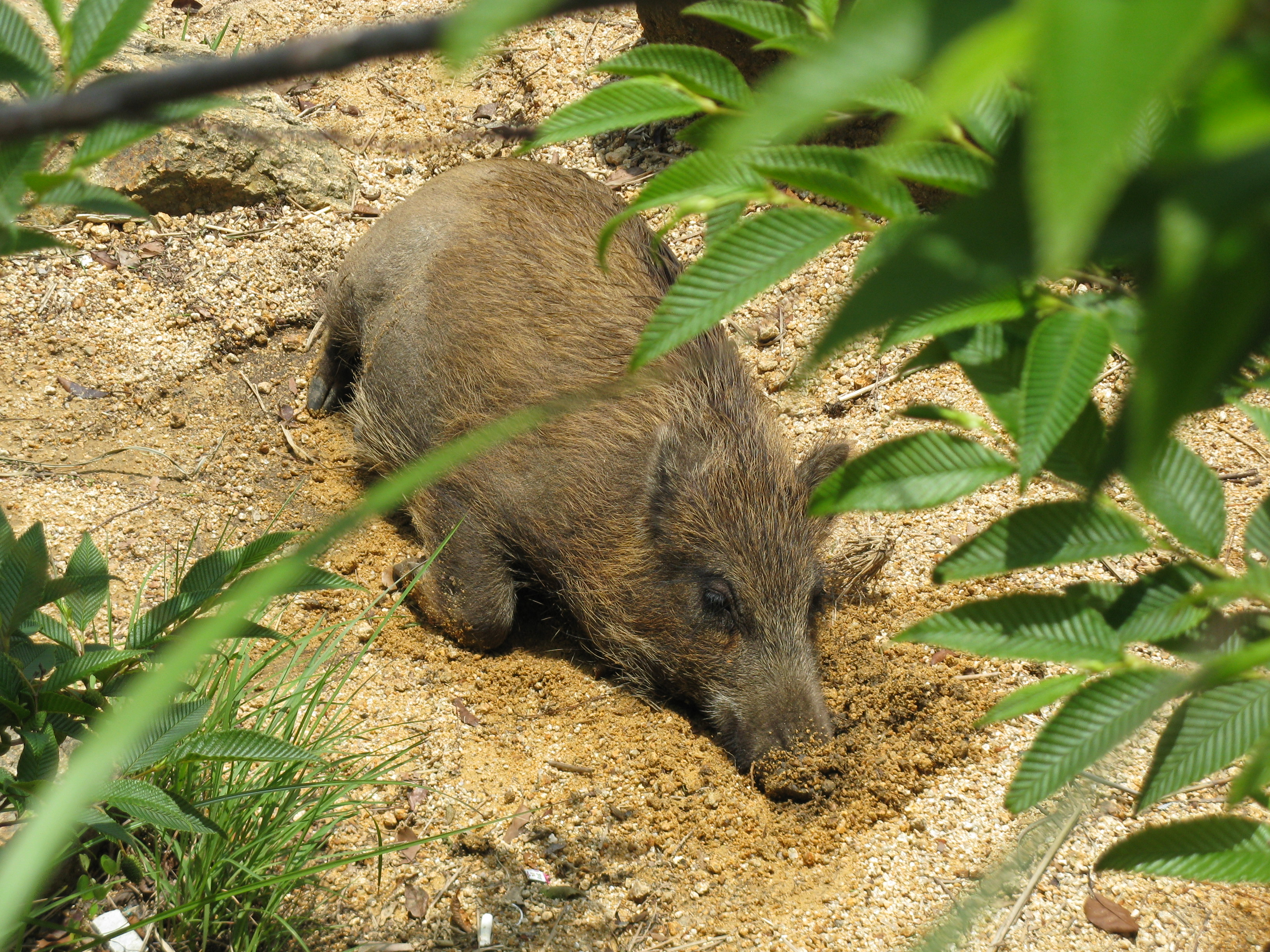 ニホンイノシシ